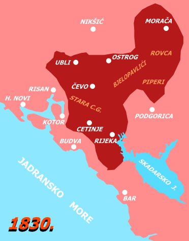 1830. Crna Gora.